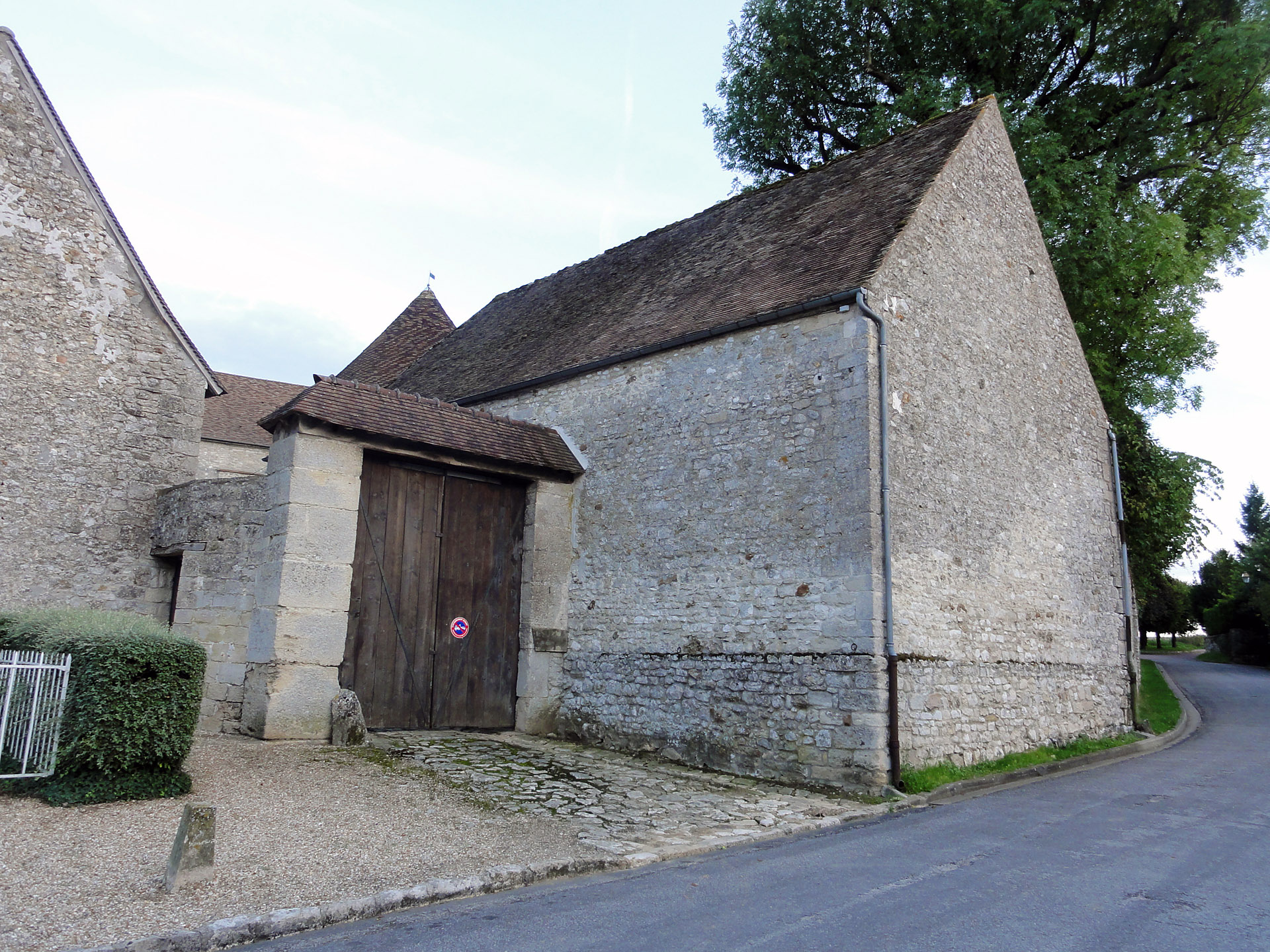 Ferme du prieuré à Chérence, Val-d'Oise, France.